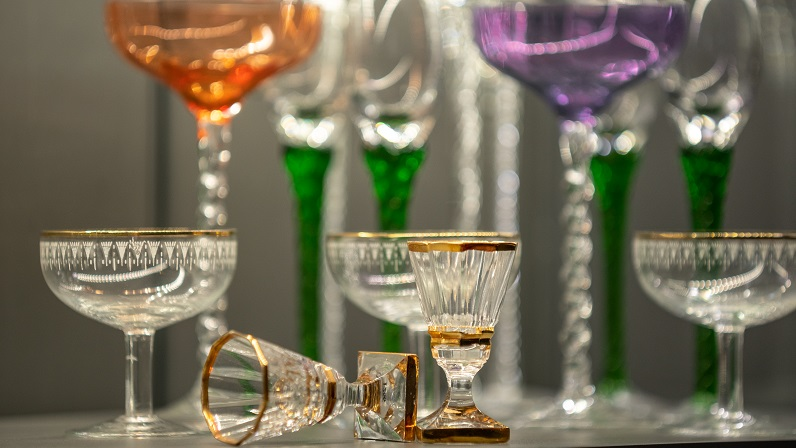 Obiekty w Muzeum Wódki